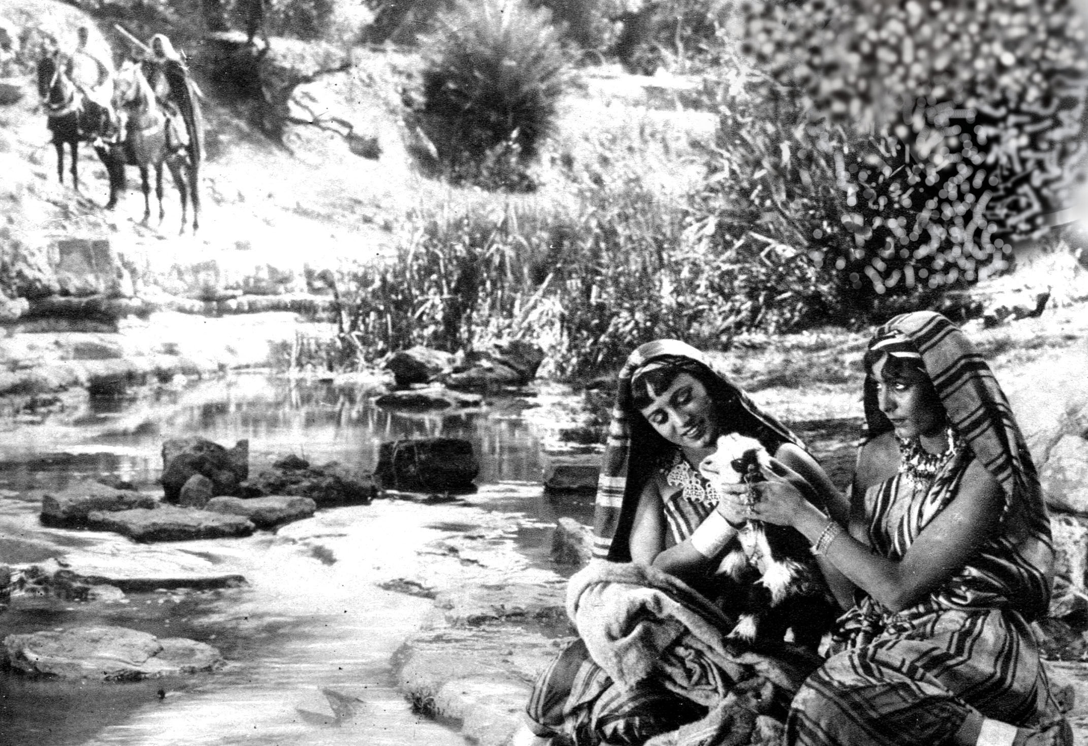 Kif Tebbi - regia di Mario Camerini - produz A.D.I.A. Roma 1928 - foto di scena